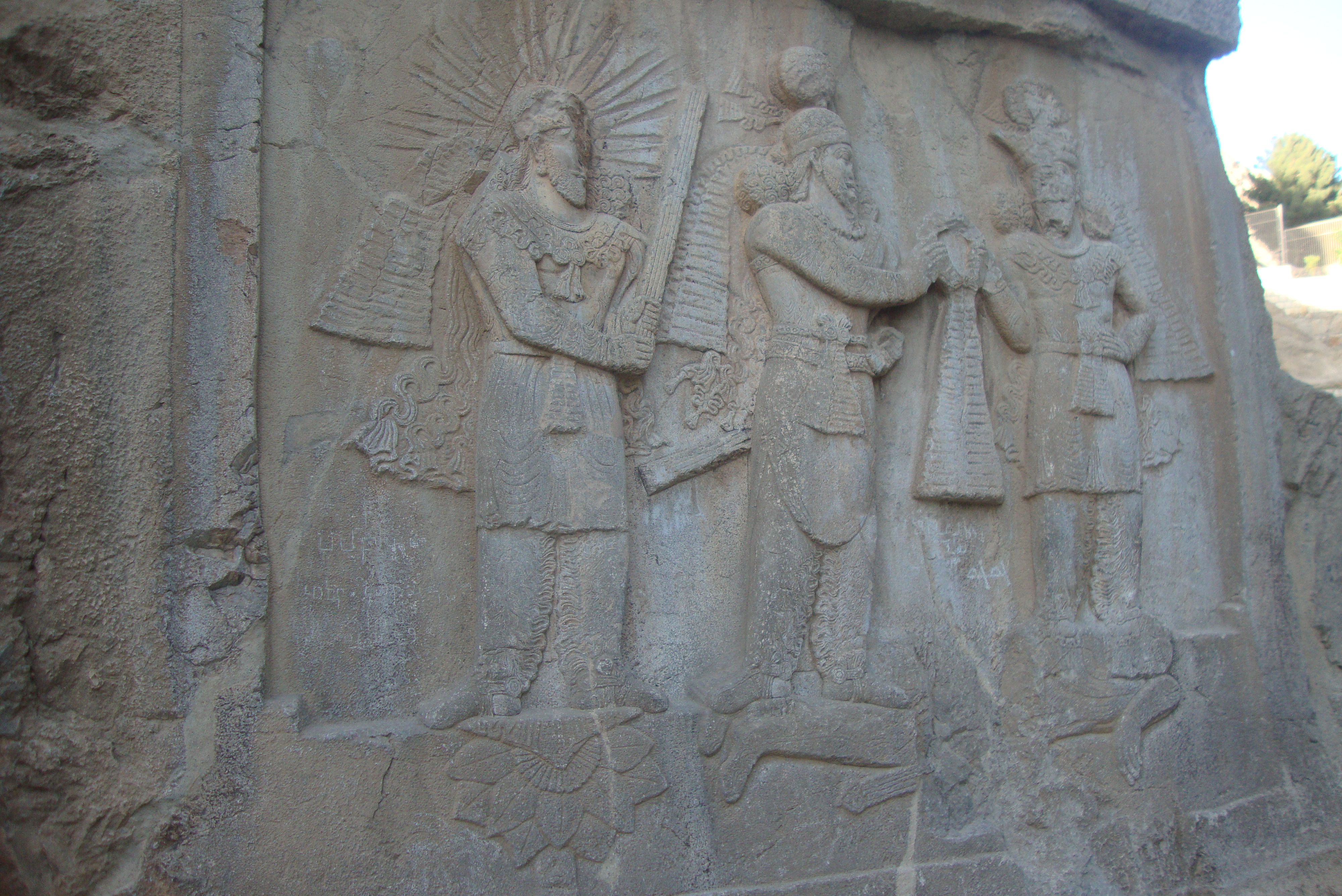 نقش‌برجسته تاج‌گذاری اردشیر دوم- طاق بستان